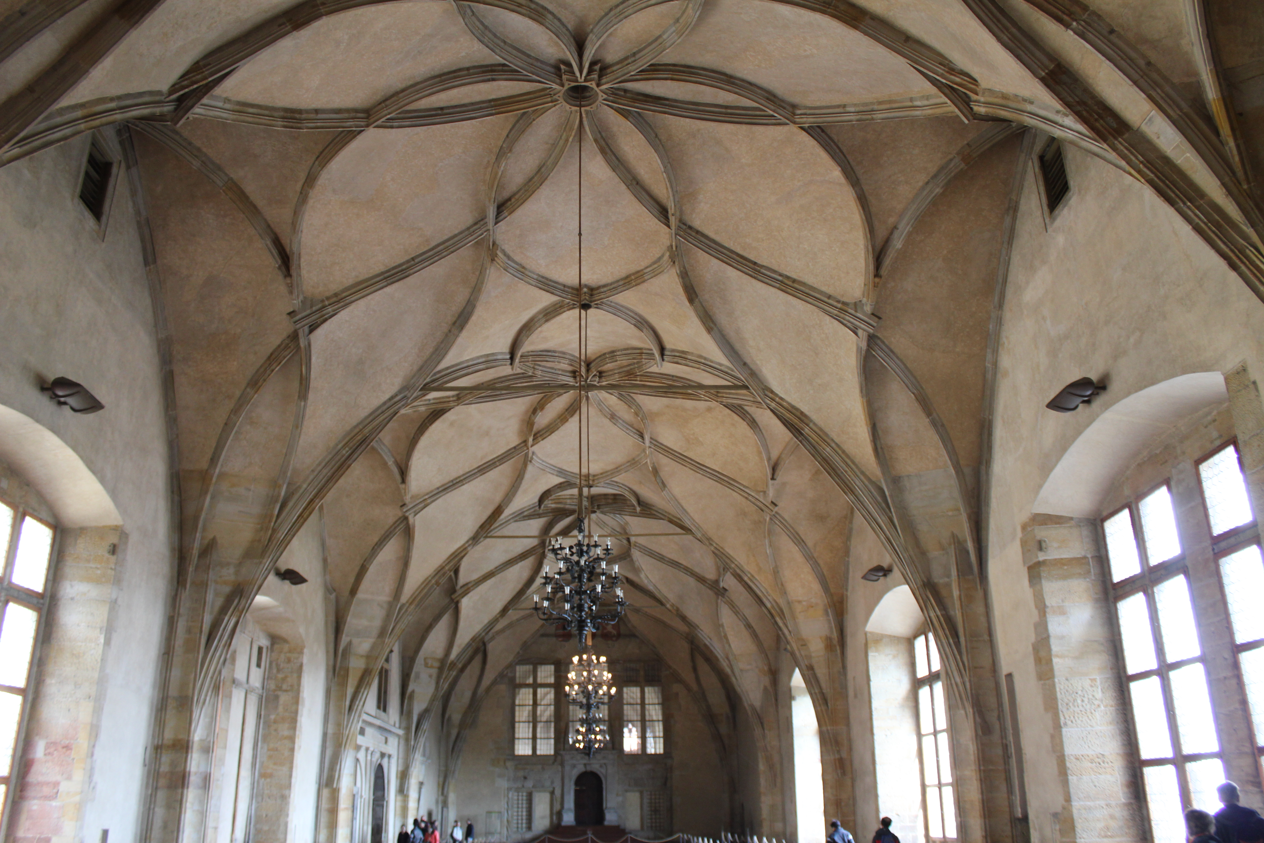 Vladislav - salen - hall Salens praktfulle ribbehvelving er tegnet av Benedikt Ried i 1490-årene prahaborgen Pragua Castle